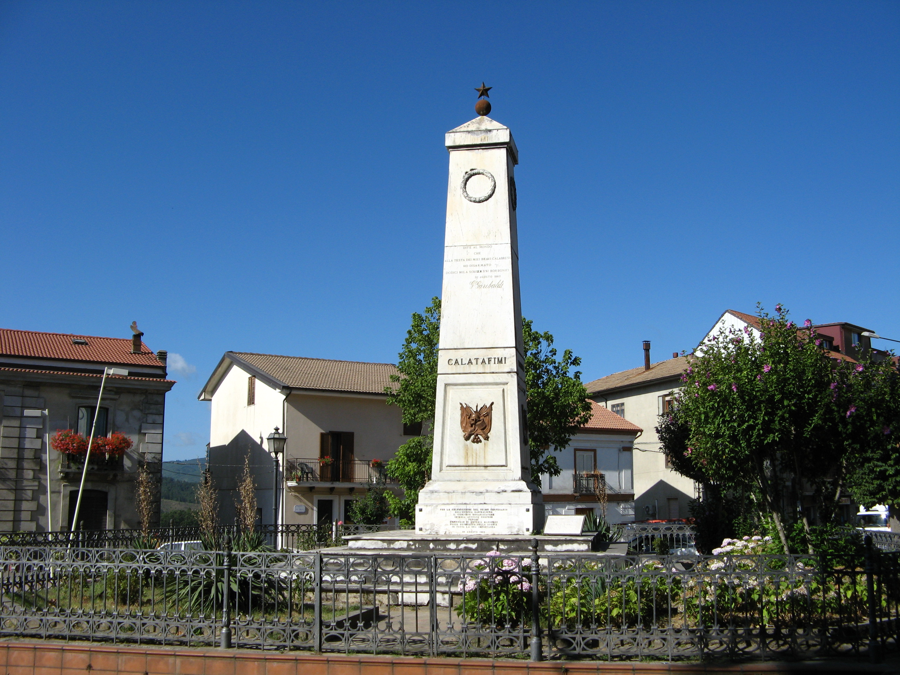 Soveria Mannelli, Obelisco a Piazza dei Mille